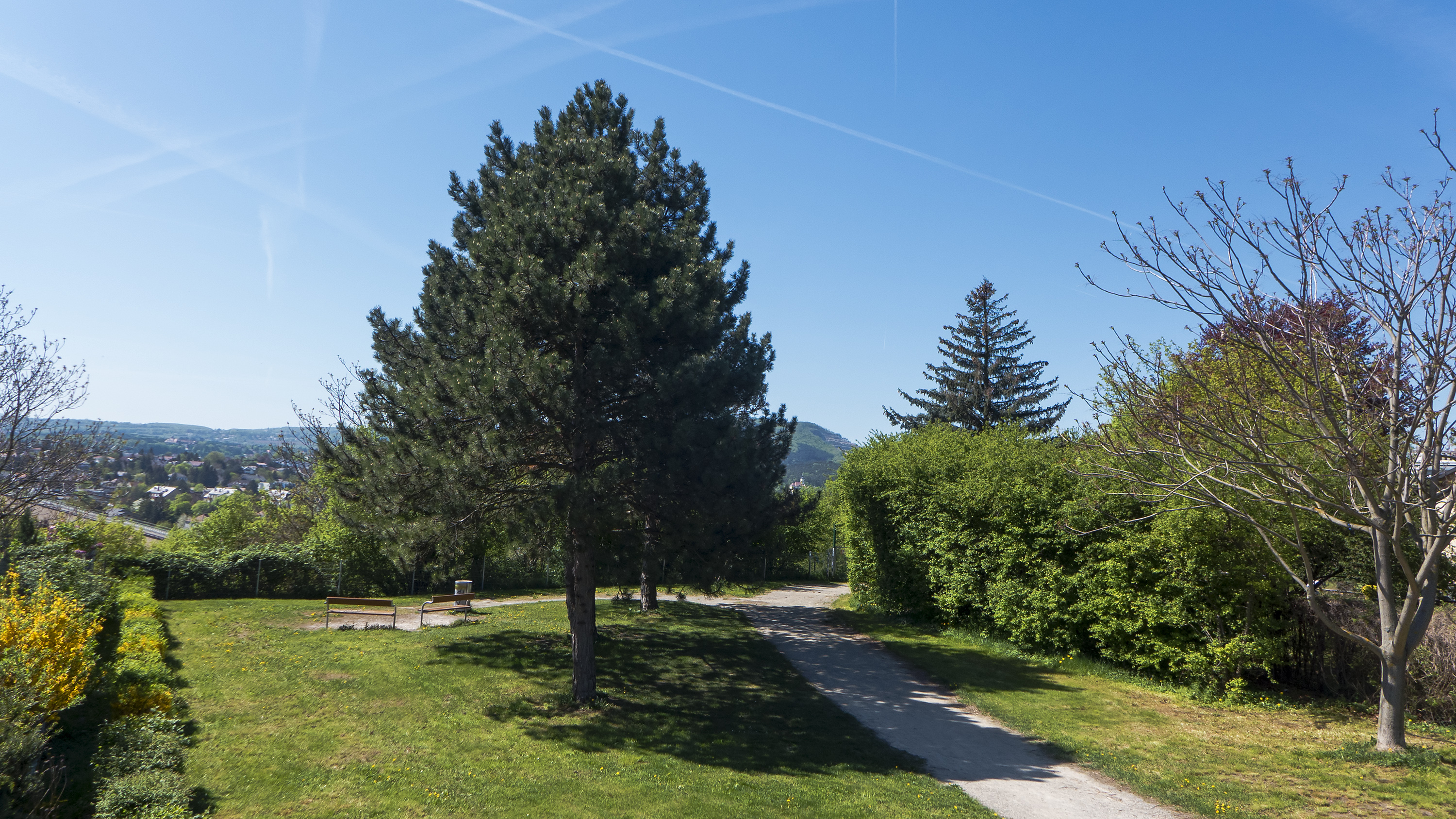 Bertha-Neumann-Park in Wien 23